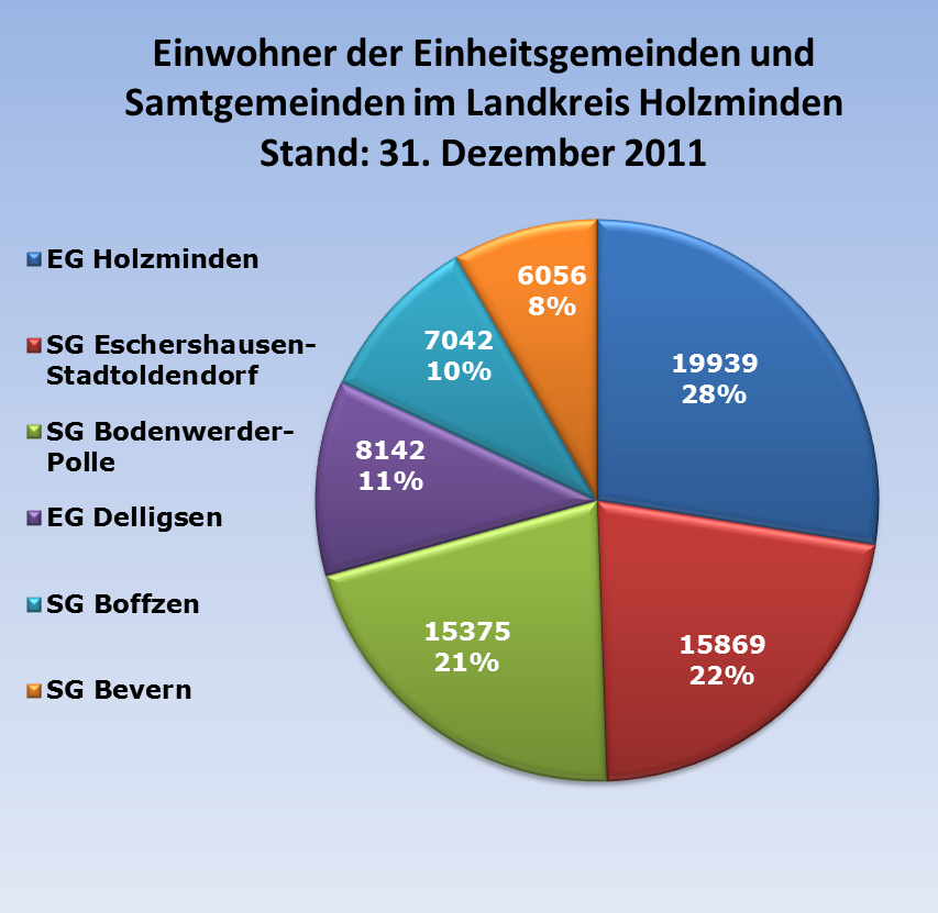 Bevölkerungstatistik: Einwohnerstand der Einheitsgemeinden (Holzminden, Deligsen) und Samtgemeinden im Landkreis Holzminden zum 31. Dezember 2011. Datenstand des Landesbetriebs für Statistik und Kommunikationstechnologie Niedersachsen (LSKN).